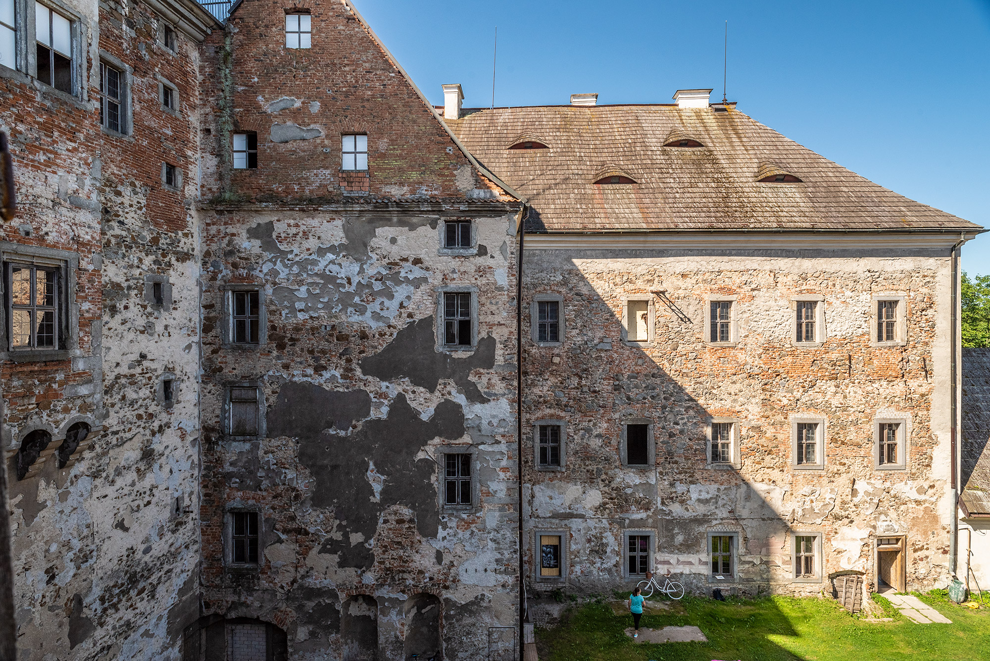 Zámek Rožmitál pod Třemšínem